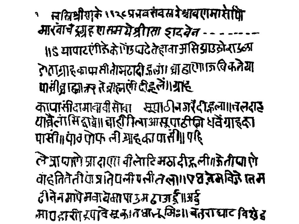 Marathi Shila lekh Year 1130